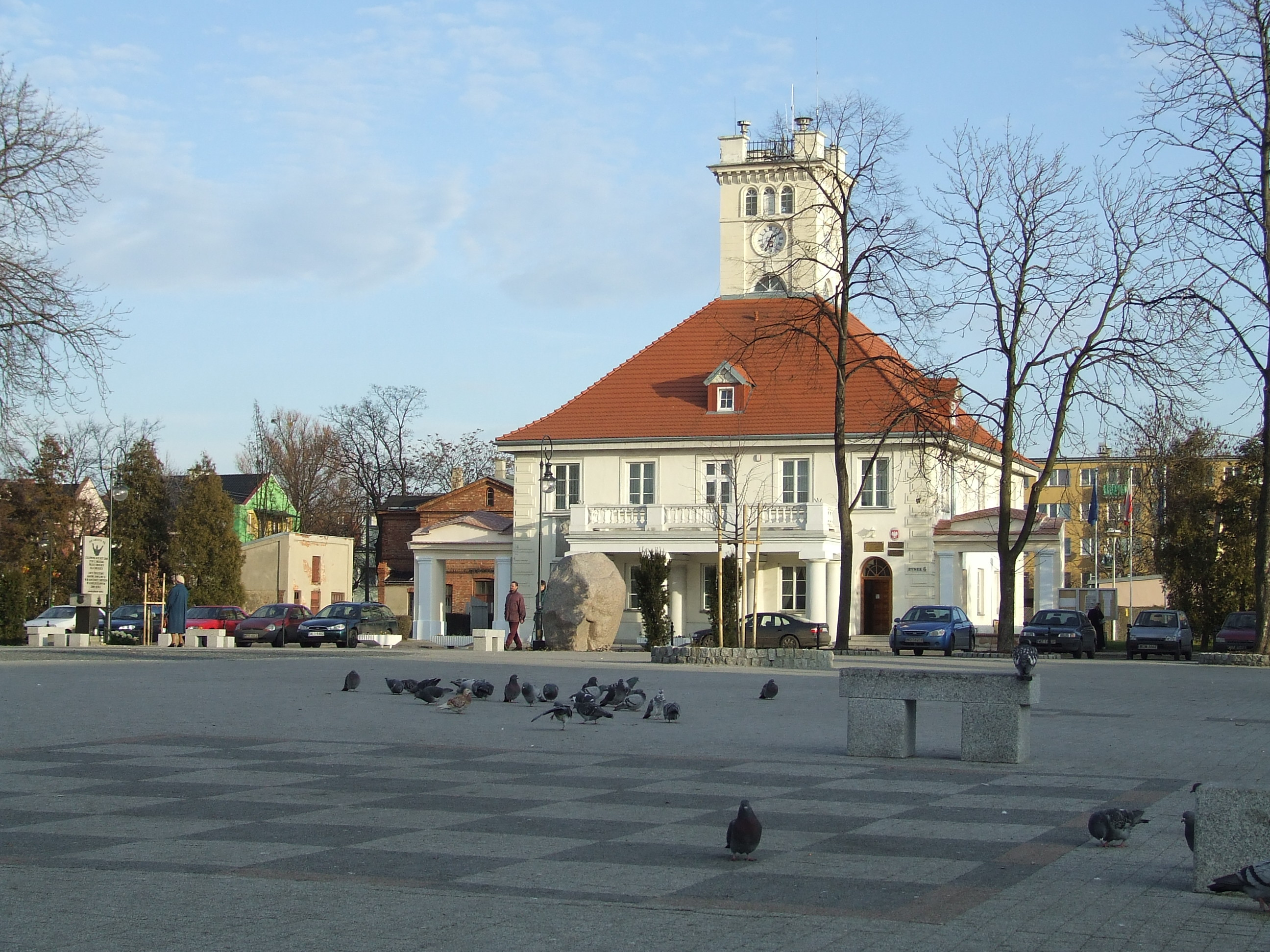 Błonie, ratusz z 1842